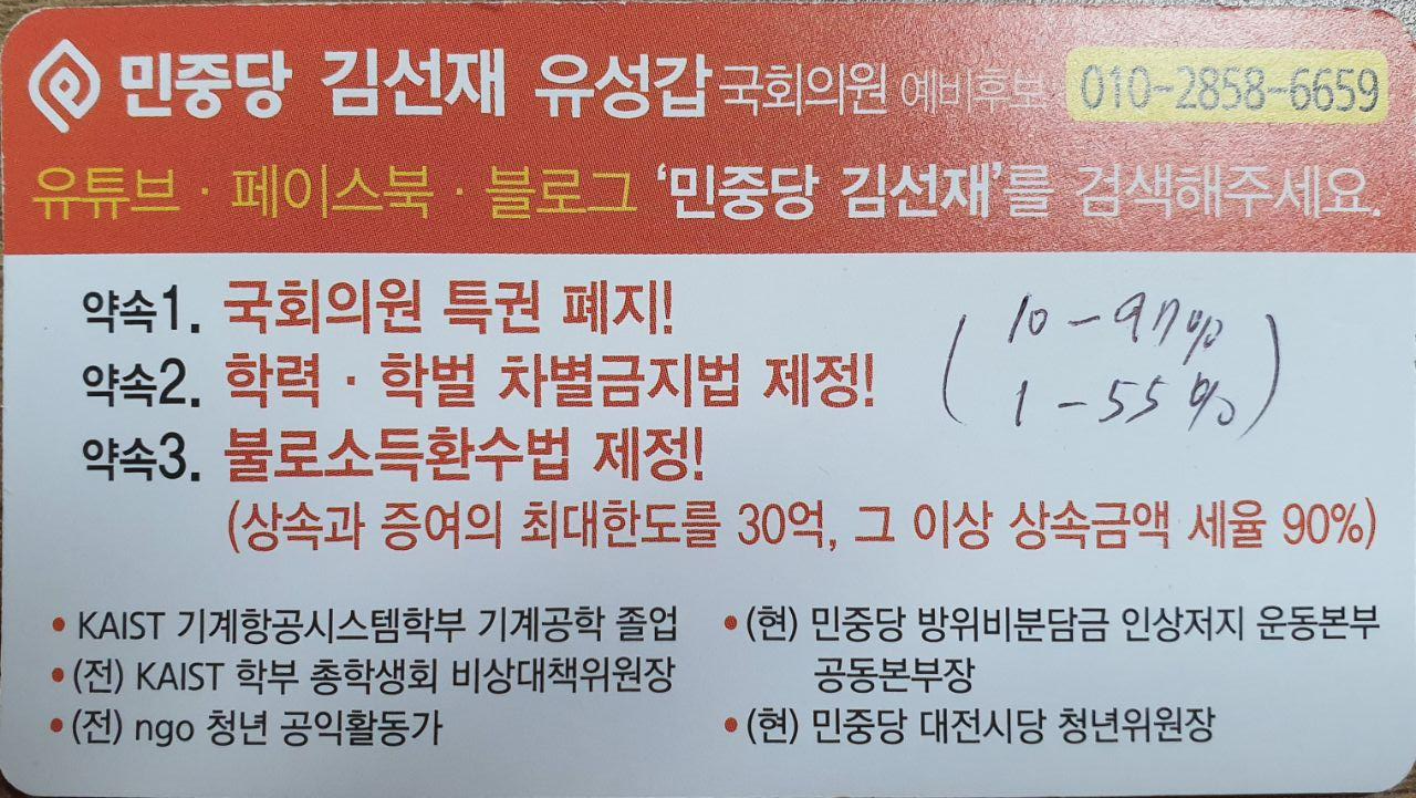 2020년 1월 유성구에서 뿌려진 명함